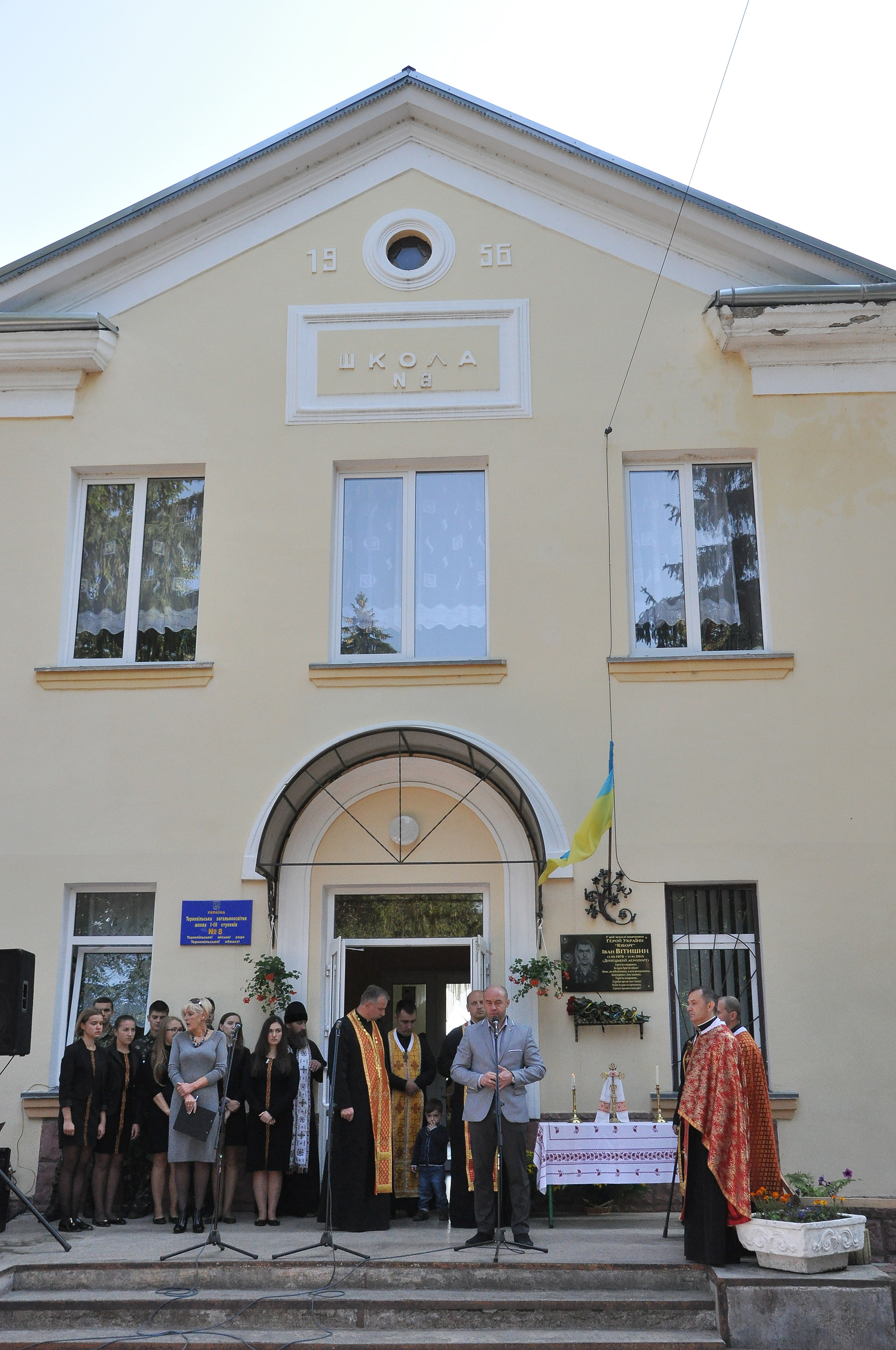 Відкриття пам'ятної дошки Іванові Вітишину на фасаді Тернопільської загальноосвітньої школи № 8.